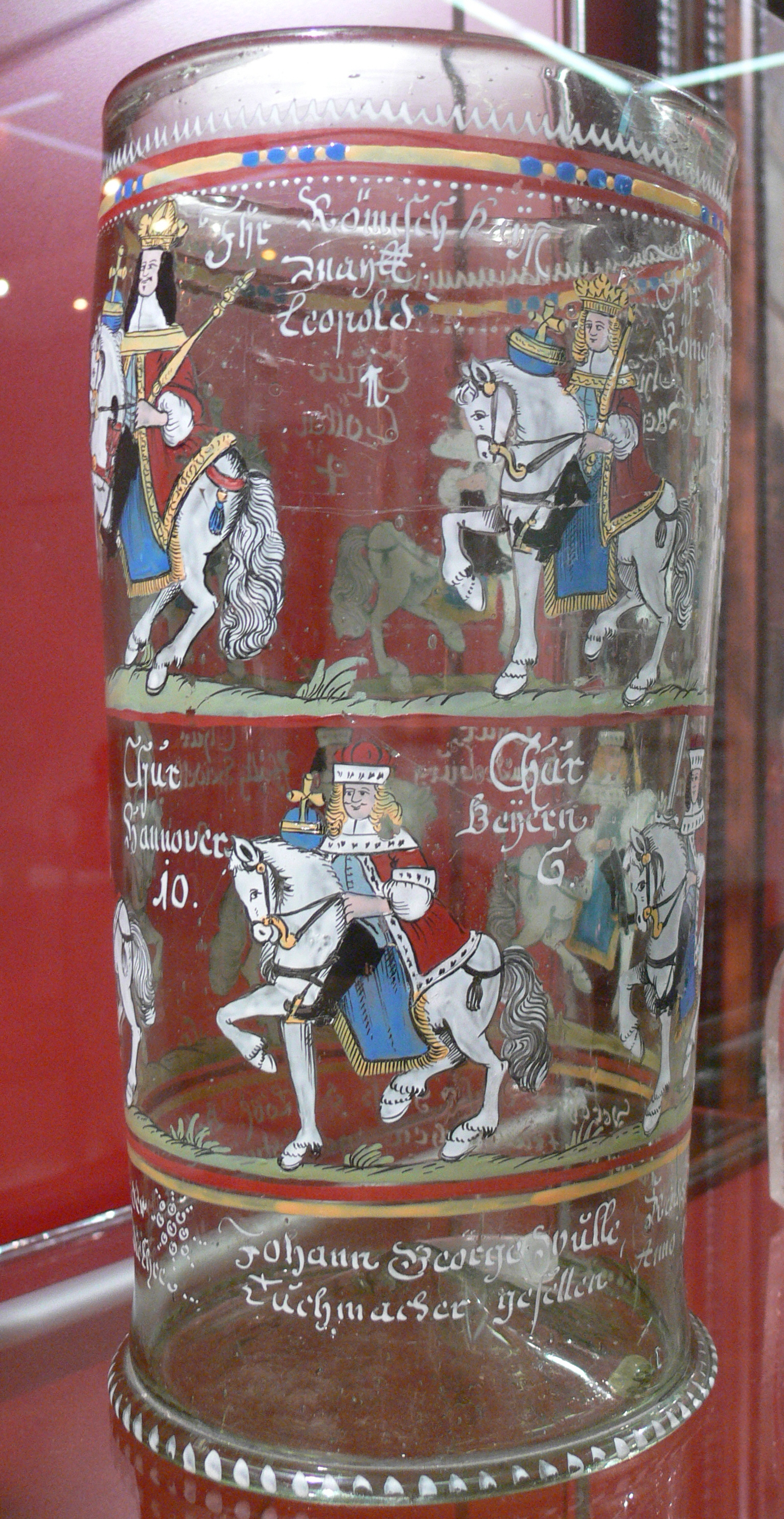 Kurfürstenhumpen; Glas und Emailmalerei; Kreibitz, Böhmen, datiert 1694; Höhe: 29,0 cm (Motiv: Reitbilder von Kaiser Leopold I., König Joseph I. und acht Kurfürsten); Inschrift: Johann George Wülle, Rathsverwandter, verehret dies Glas der löblichen Brüderschaft der Tüchermacher gesellen anno 1694 zu einem freundlichen Gedächtnis / Gott allein die Ehre Gallery: Reiss-Engelhorn-Museen, Mannheim; Inv. 1323